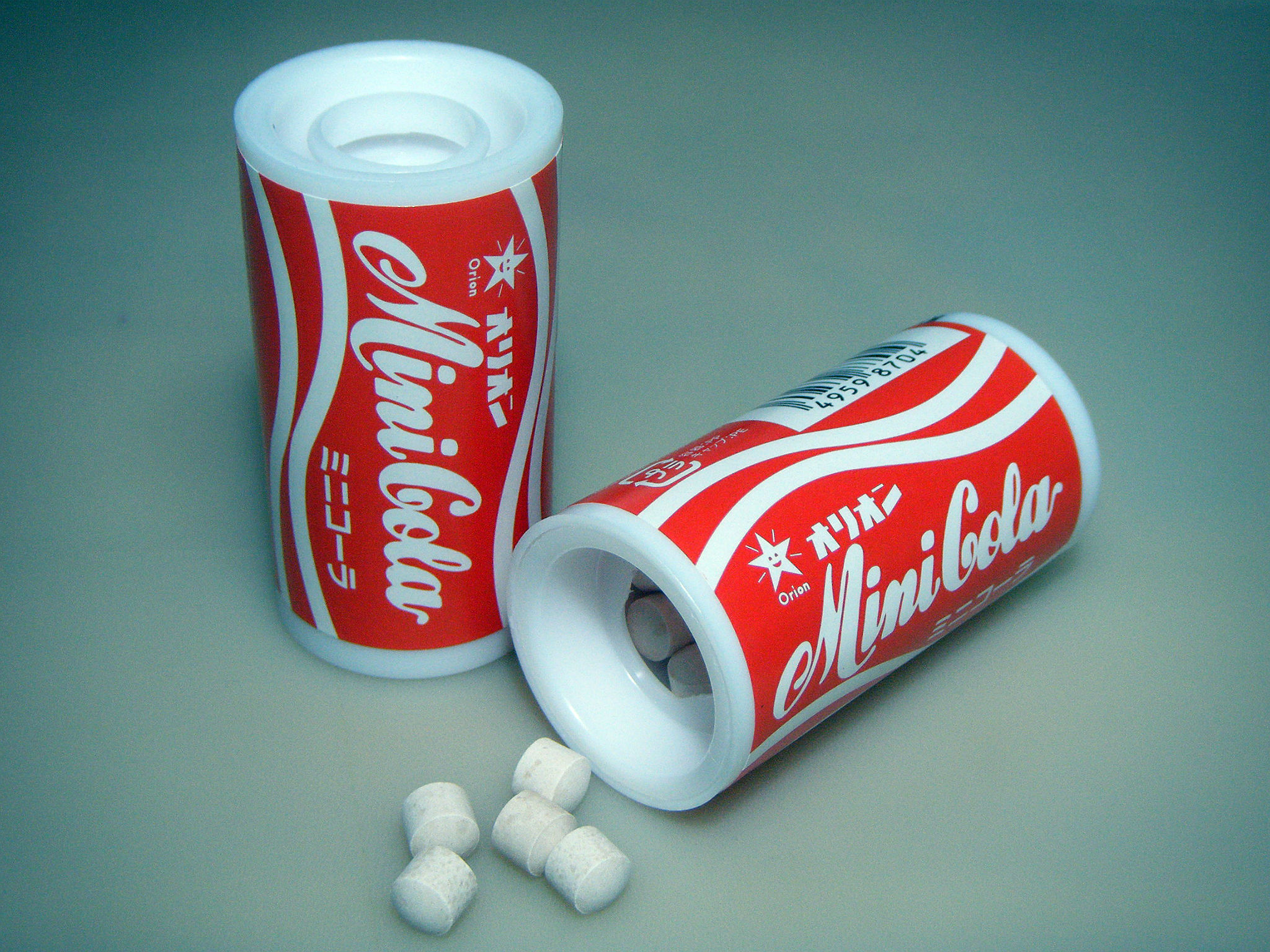 オリオン ミニコーラ 外装